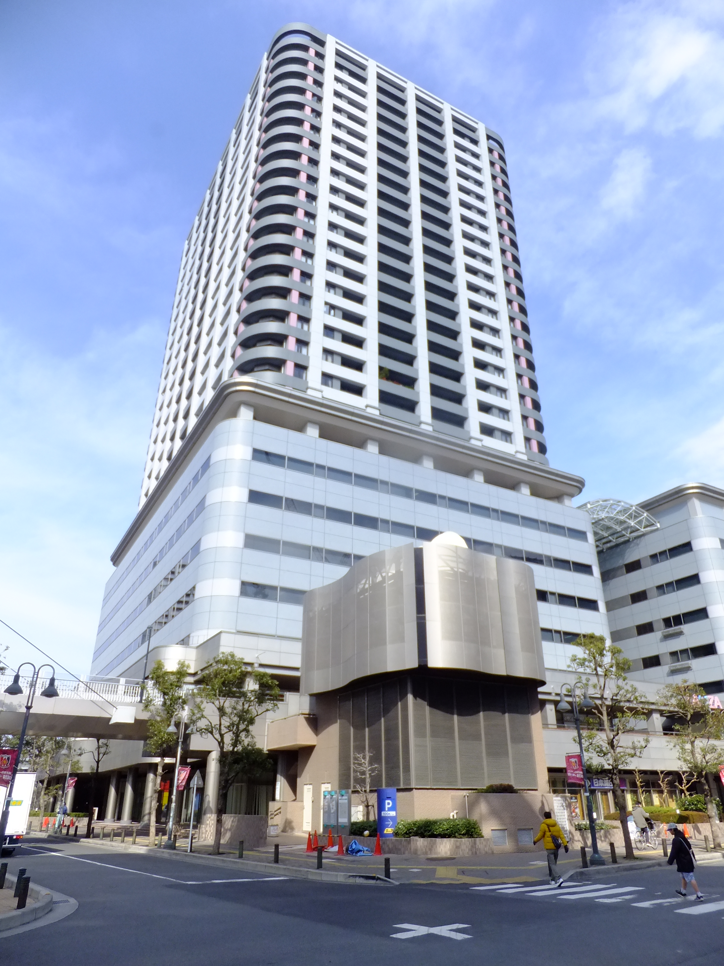 ラムザタワー武蔵浦和（さいたま市南区）